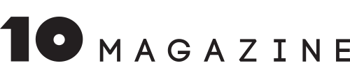 10 Magazine logo